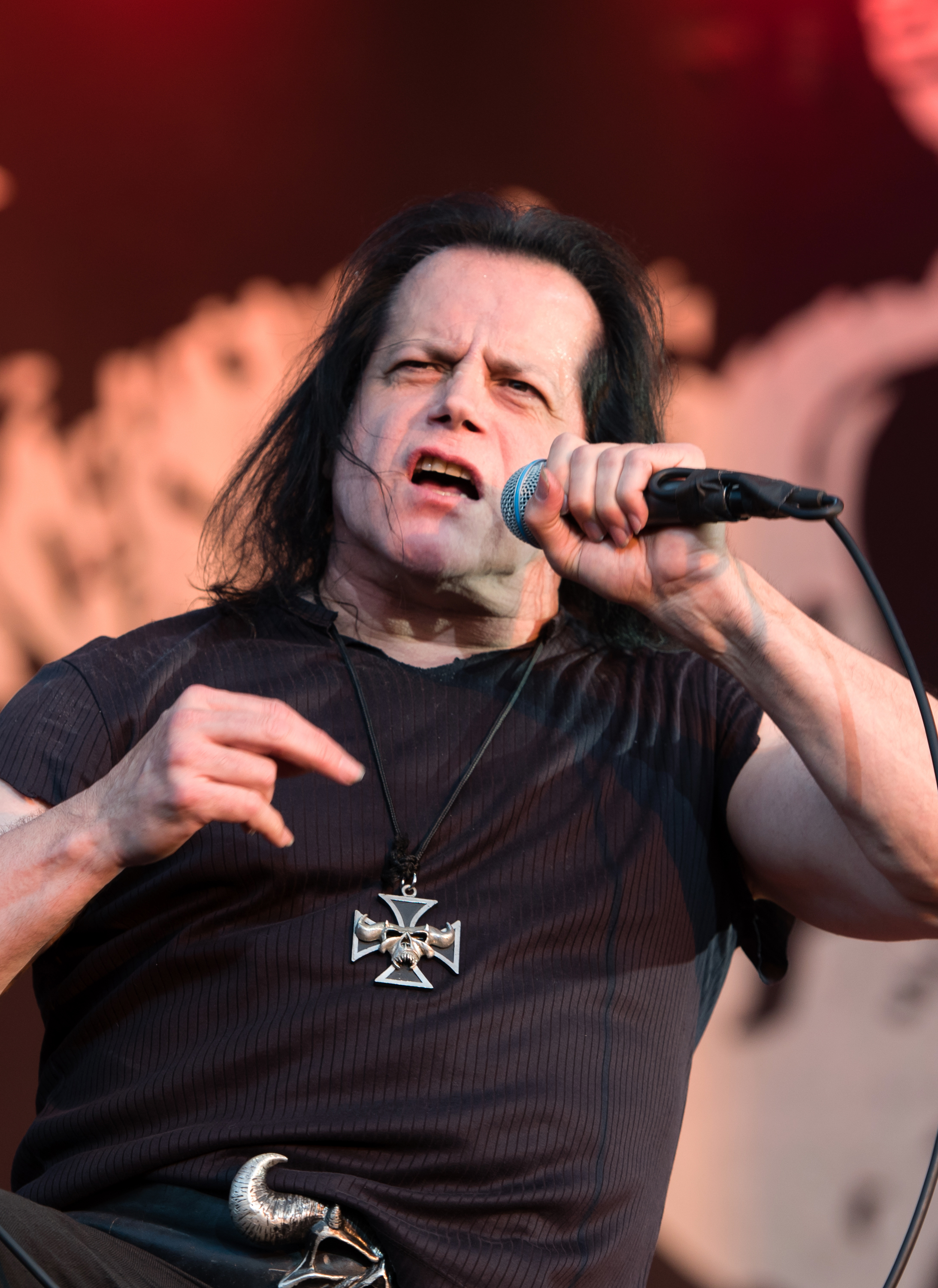 Danzig beim Wacken Open Air 2018